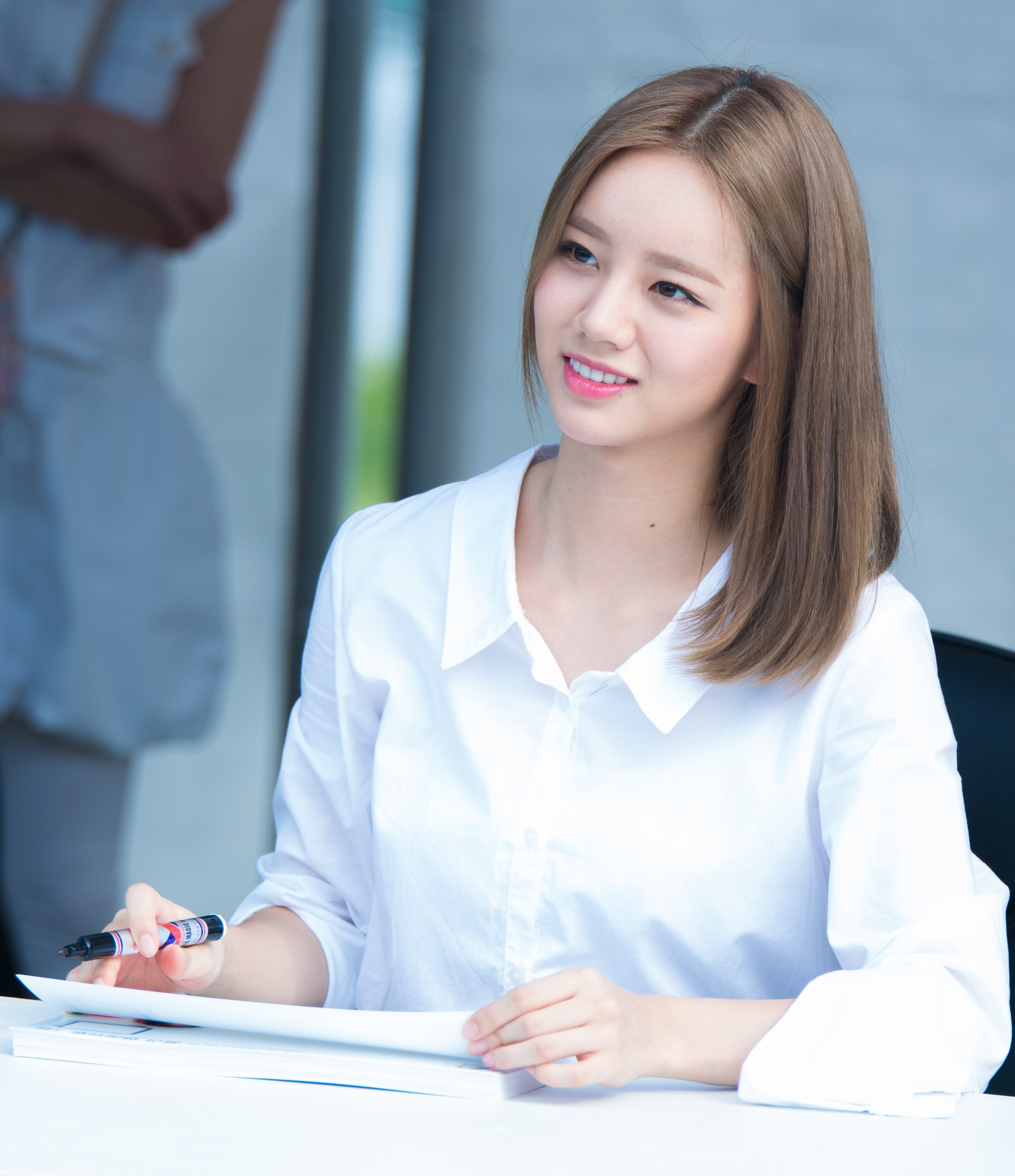 20160910 걸스데이 혜리 세븐일레븐 도시락 팬사인회